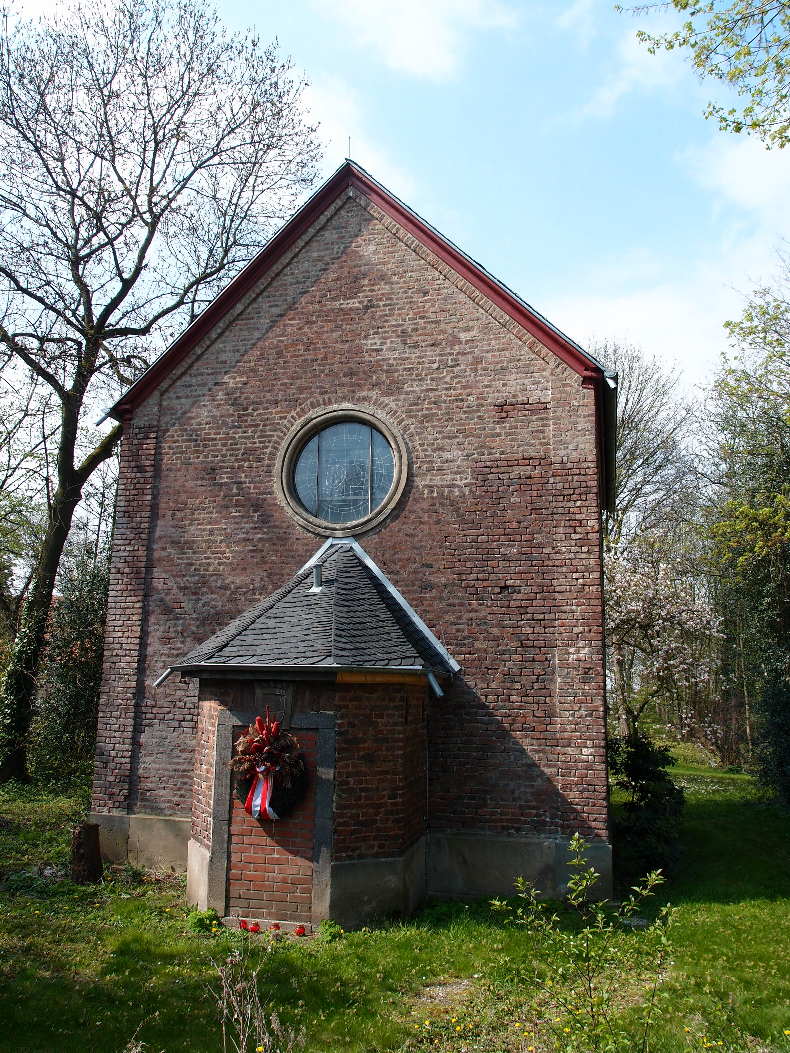 Familienkapelle der Freiherren von Eltz-Rübenach neben ihrem Schloss Wahn in Köln-Wahn Datum: 14.04.2012 Urheber: M. Pfeiffer alias Benutzer:Gordito1868 Quelle: privates Fotoarchiv des Urhebers Garantieerklärung des Urhebers: es handelt sich um ein authentisches Originalfoto, das nicht via Fotomanipulation verändert wurde